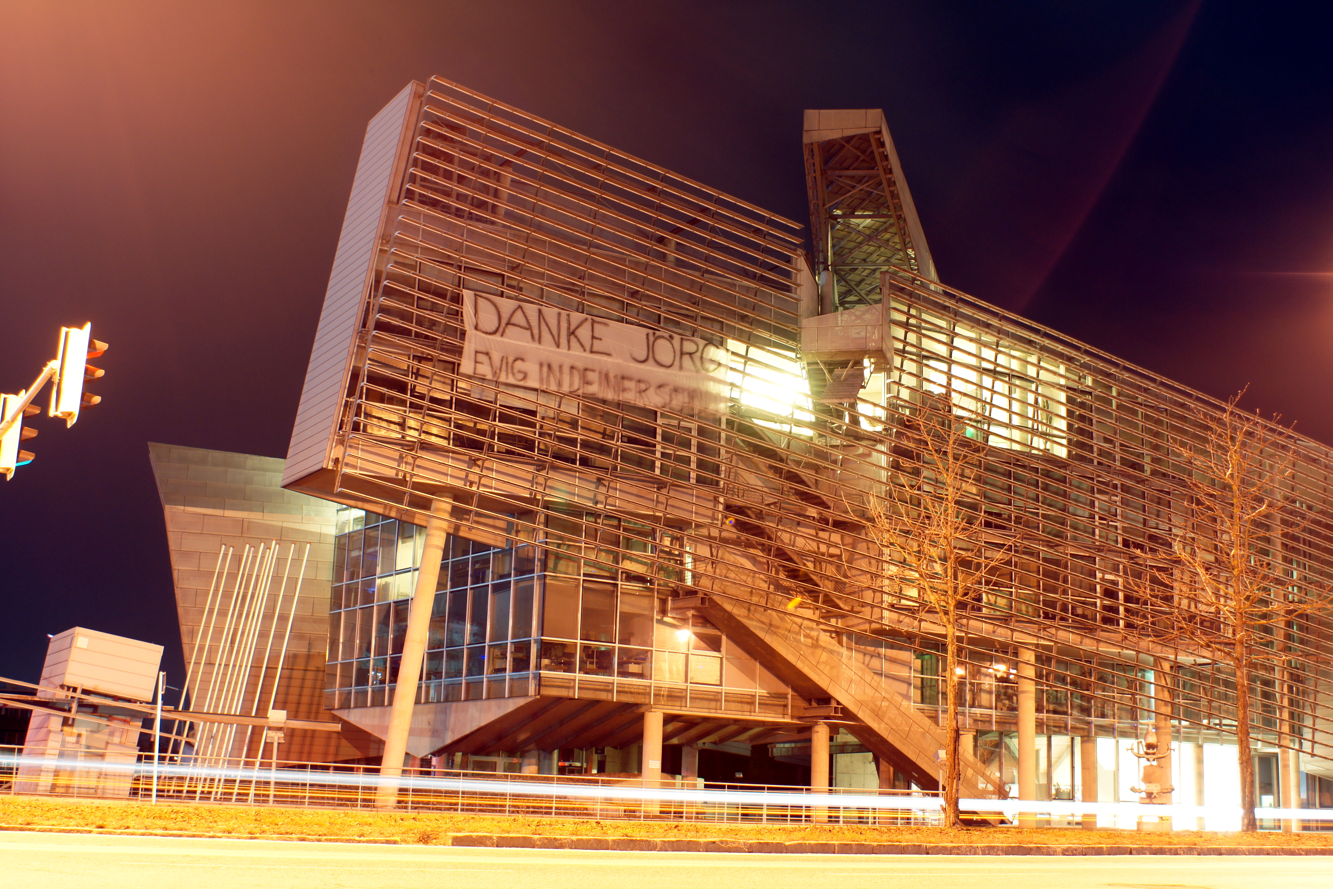 "Danke Jörg" Plakat an der Fasade der ehemaligen Hypo-Zentrale.